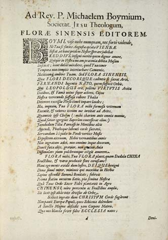 Seite aus Michał Boyms Werk Flora Sinensis